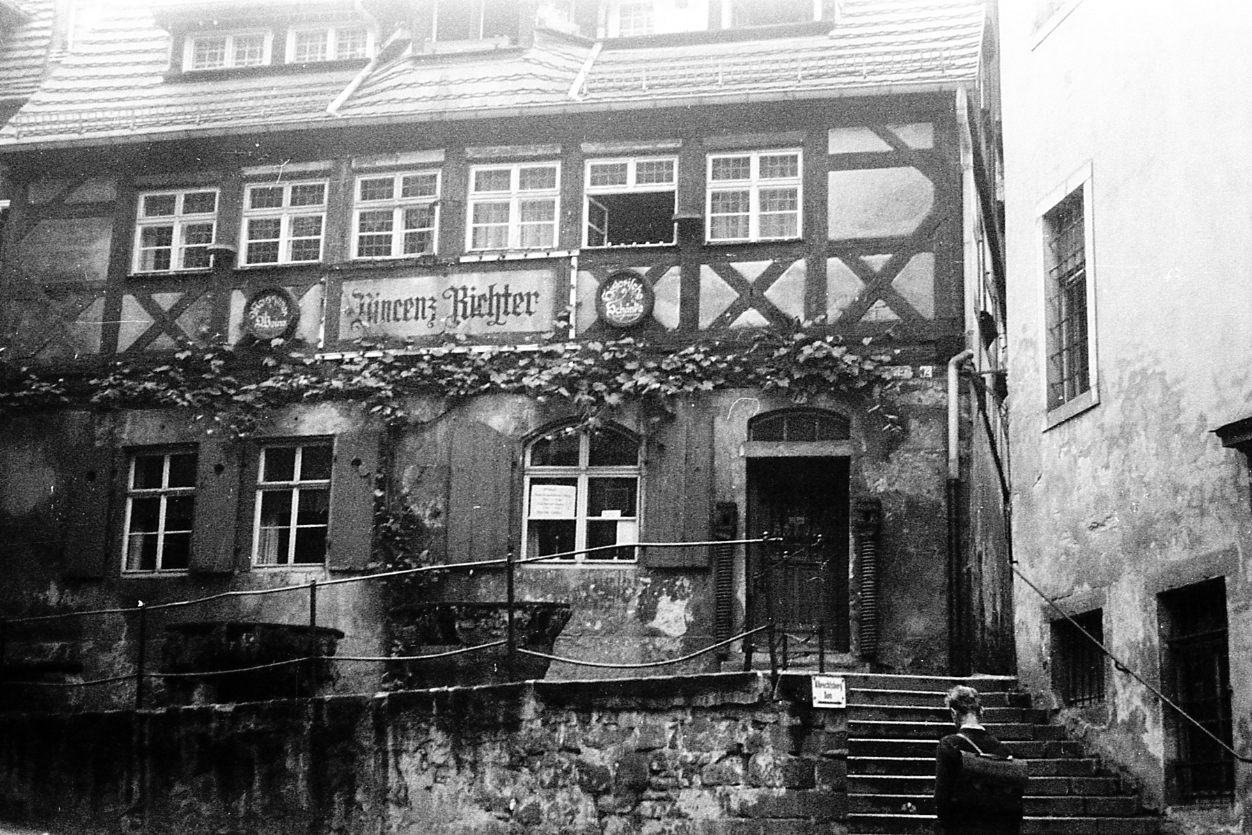 Meißen, Fachwerkhaus, Gaststätte Vincenz Richter